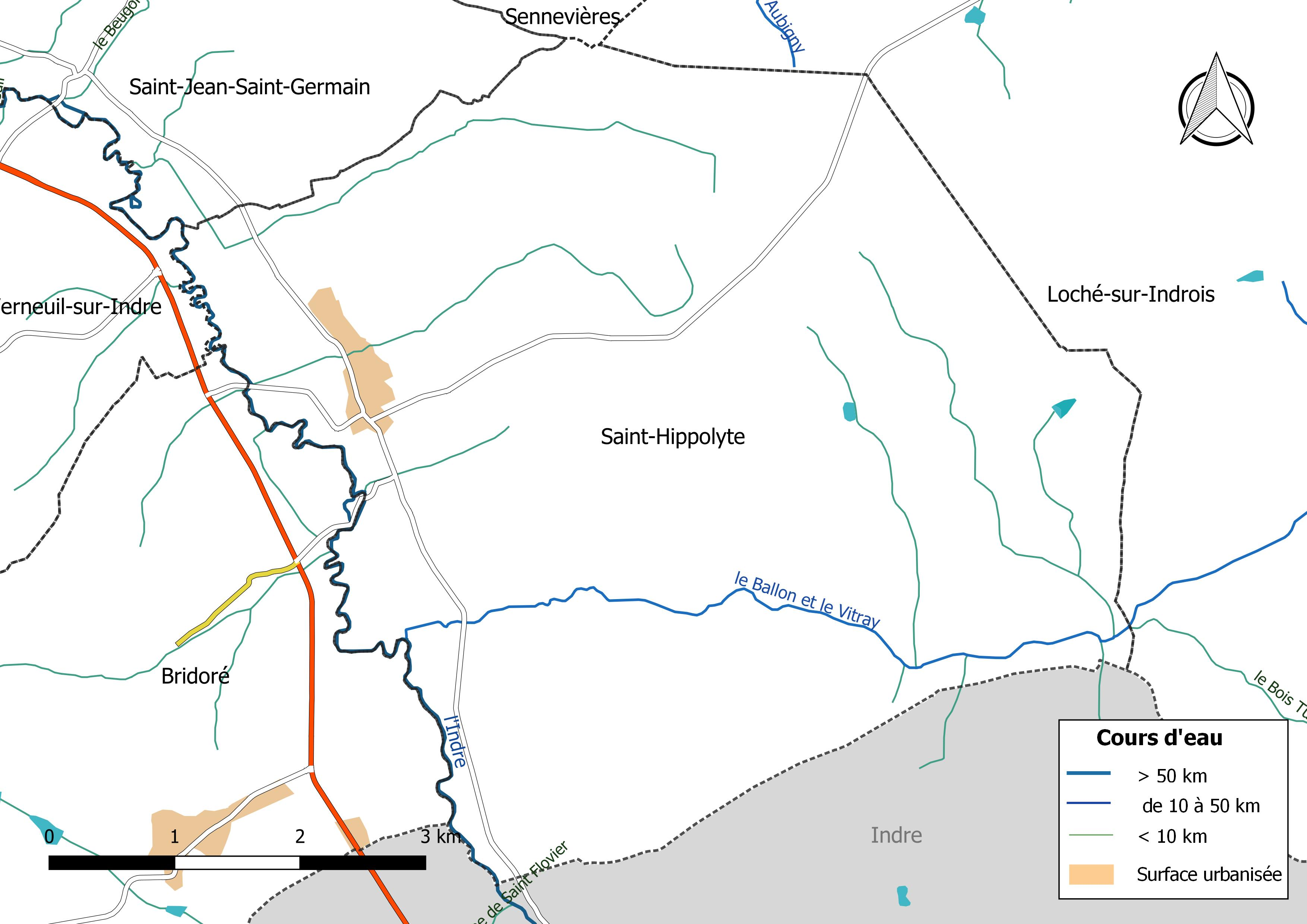 Carte du réseau hydrographique de la commune de Saint-Hippolyte (Indre-et-Loire) (France).